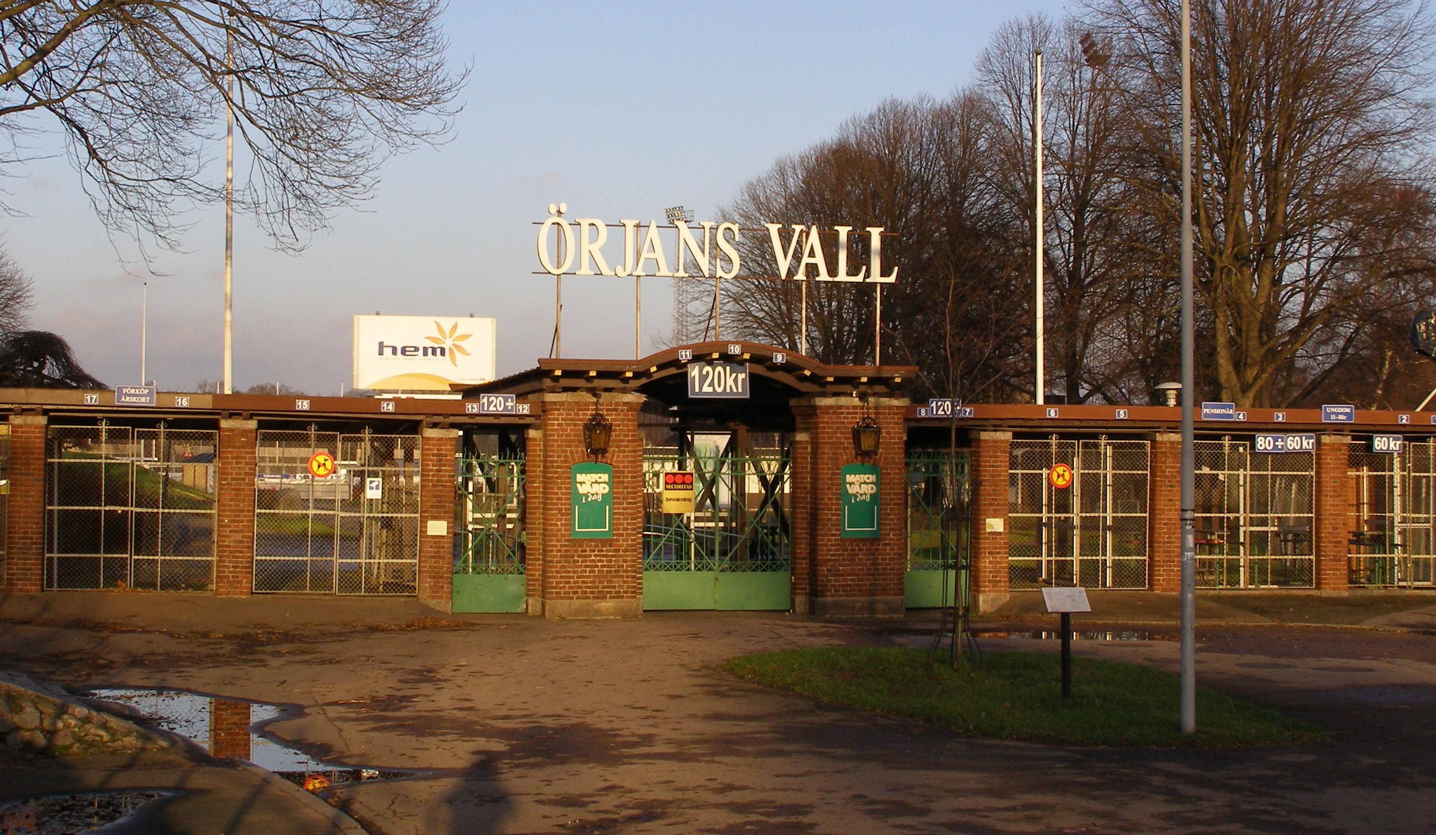 Örjans vall, Halmstad. Hemmaarena åt Halmstads BK och IS Halmia.